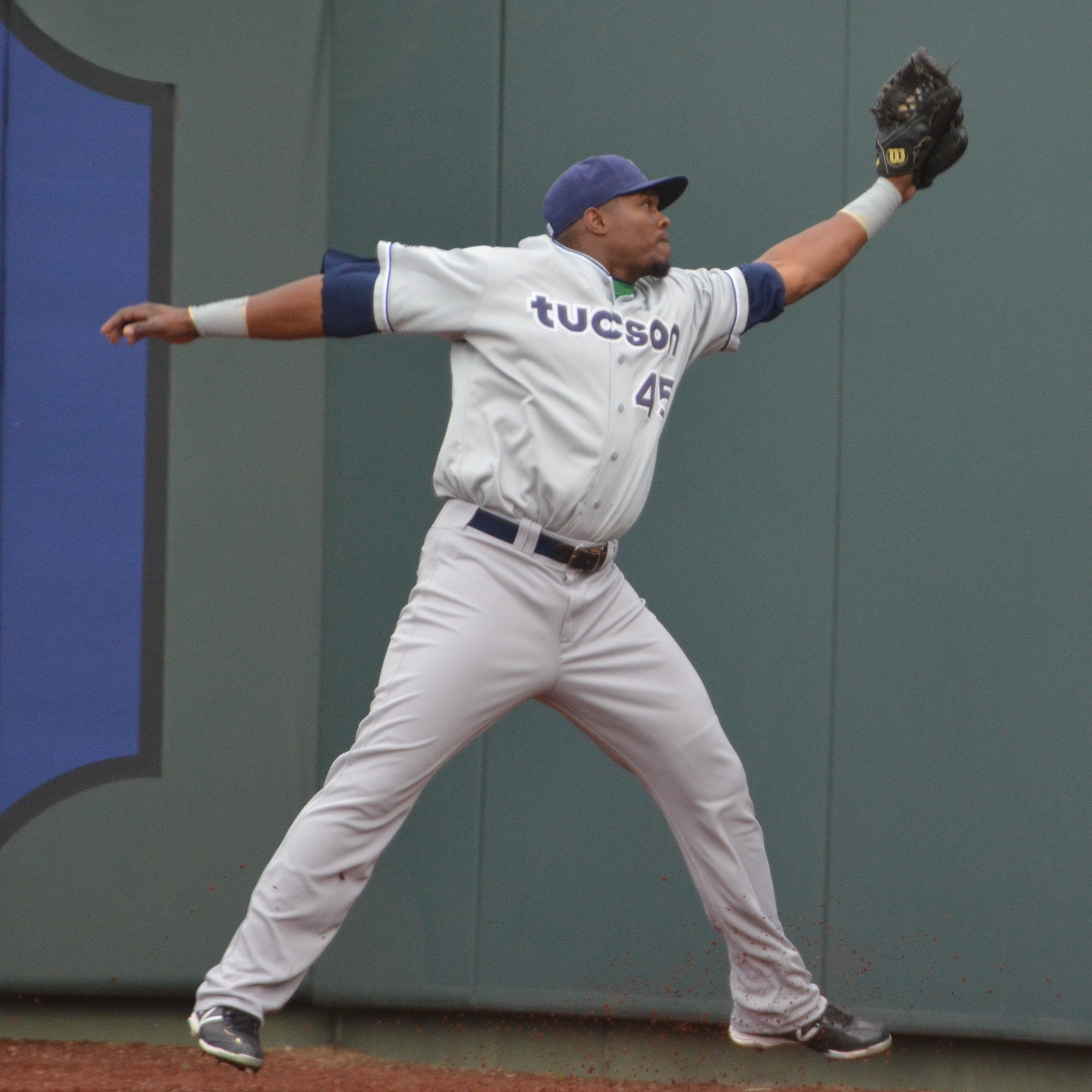 Mike Wilson